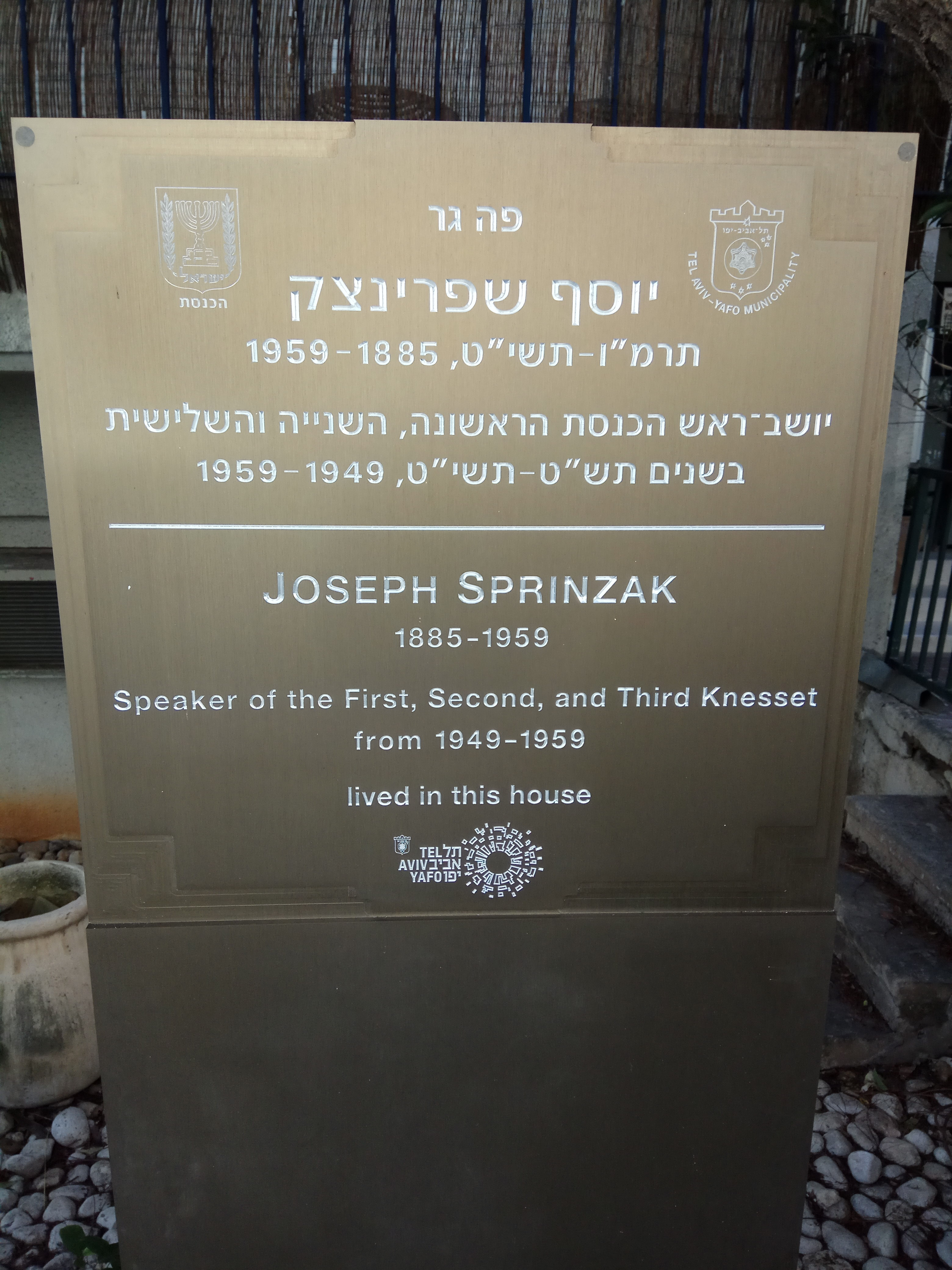 שלט הנצחה ליוסף שפריצק בכניסה לביתו ברחוב מאפו 28 בתל אביב